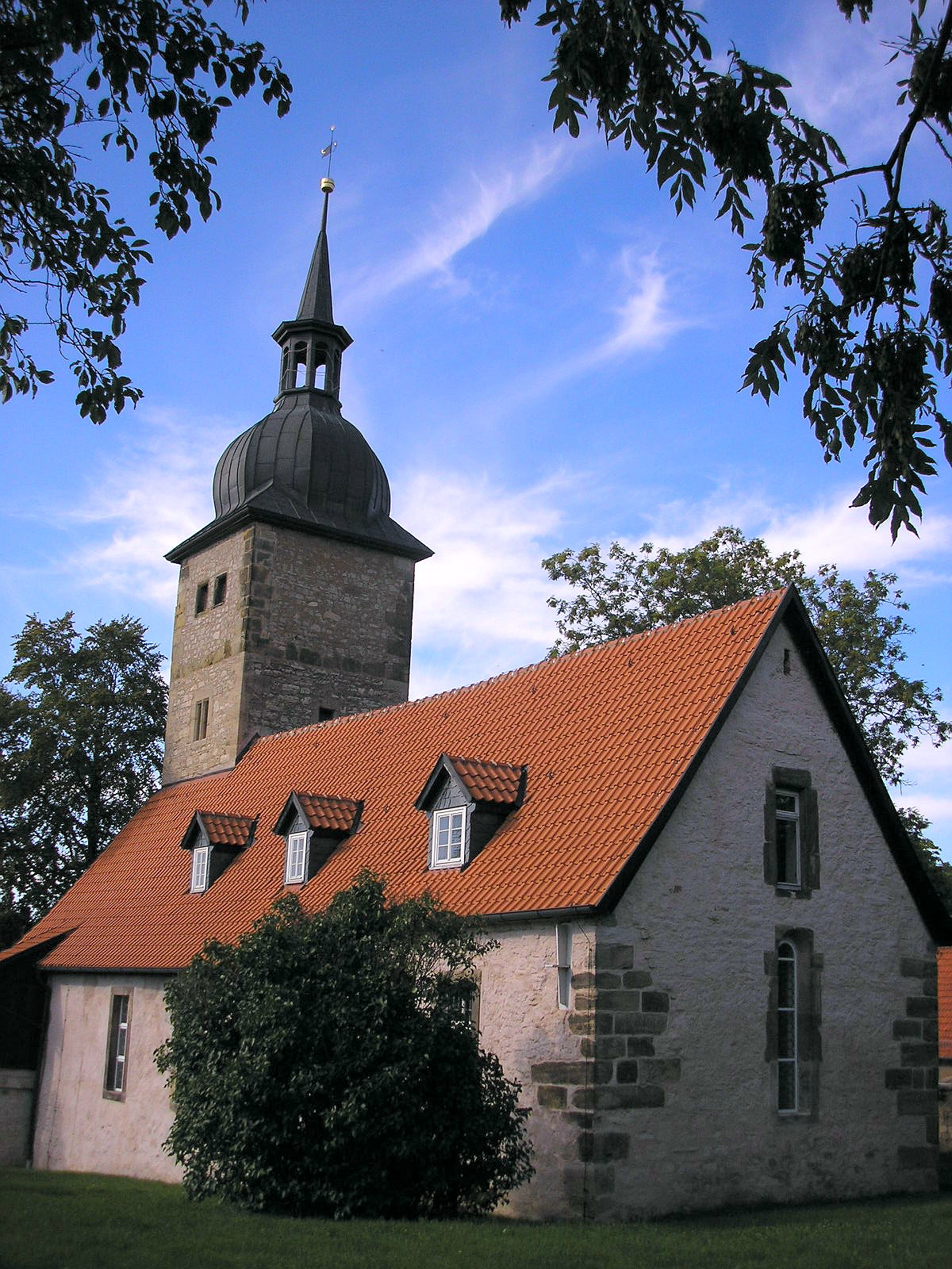 Die Kirche von Marlishausen (Ilm-Kreis, Thüringen, Deutschland)